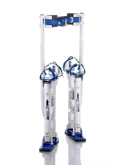 Bild von Stelzen für Hand- und Heimwerker